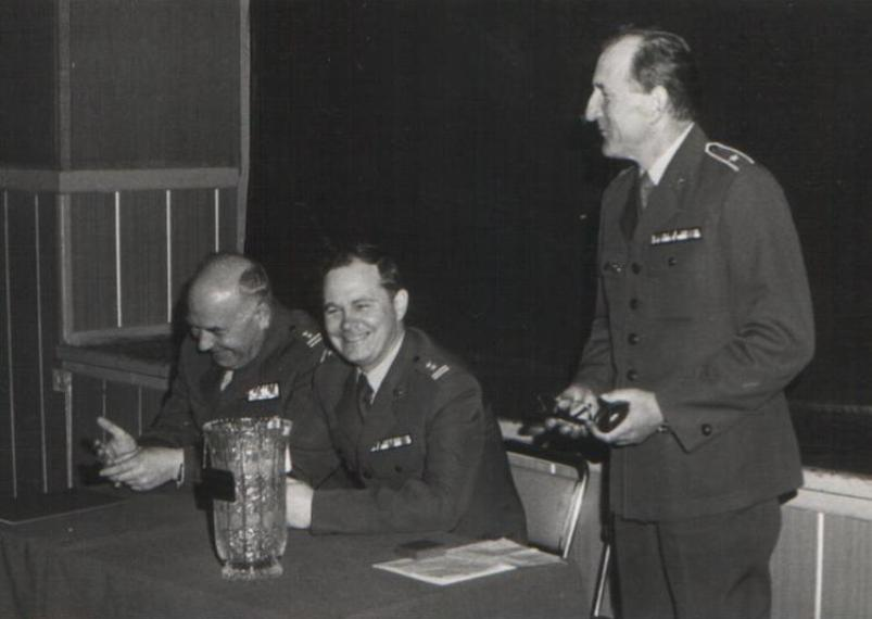 Przasnysz, 1981r. Pożegnanie z armią chor. Szelkowskiego, w środku dowódca ppłk Marian Szklarek